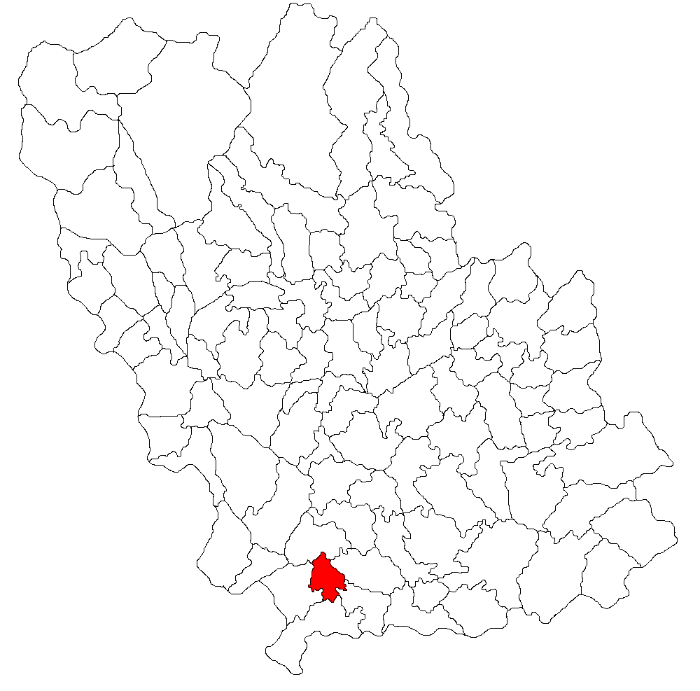 Categorie:Hărţi ale judeţului Prahova